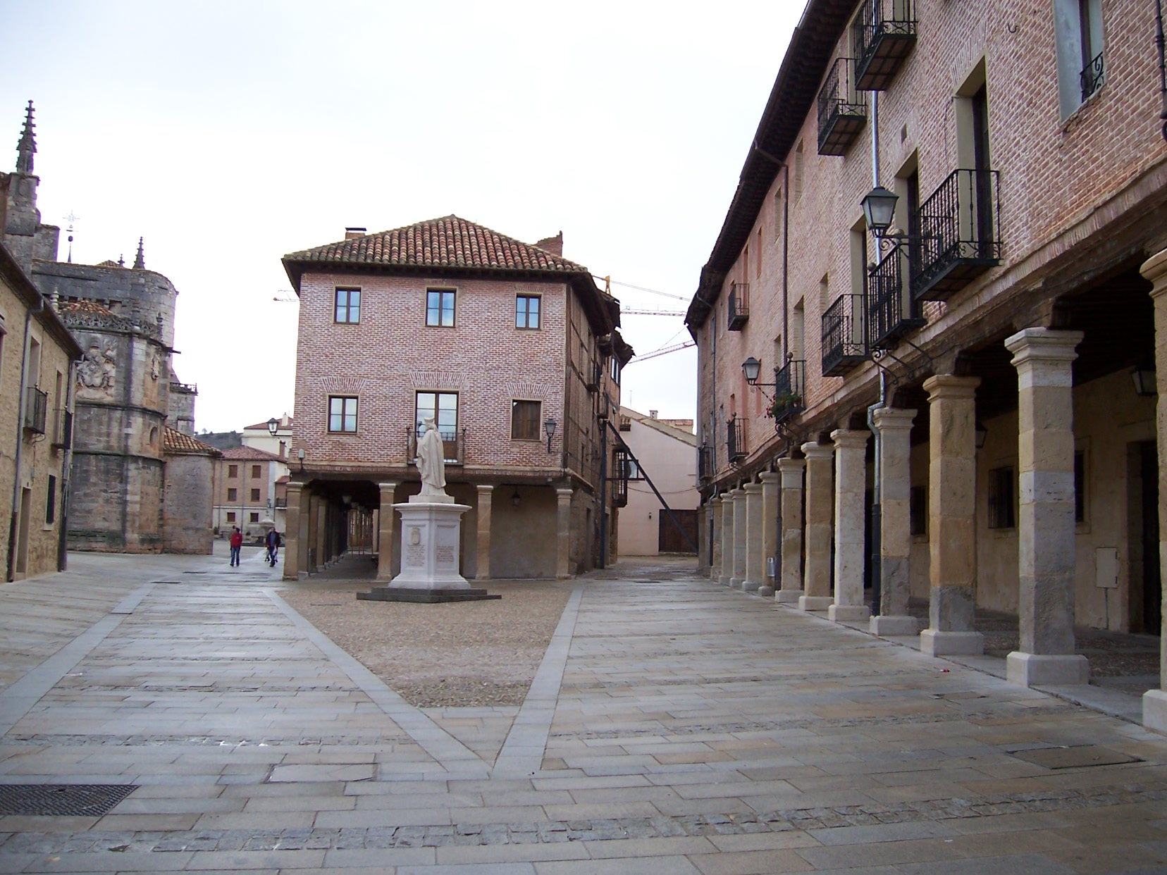 El Burgo de Osma (Soria, España). Autor de la imagen: LourdesCardenal, octubre de 2005.